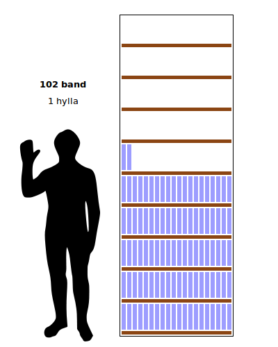 Visar svenskspråkiga Wikipedias storlek om den var i bokform 2012-12-05. Skärmdump från Wikipedia:Statistik/storlek.